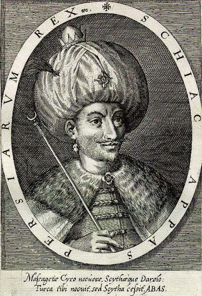 Shah Abbas I